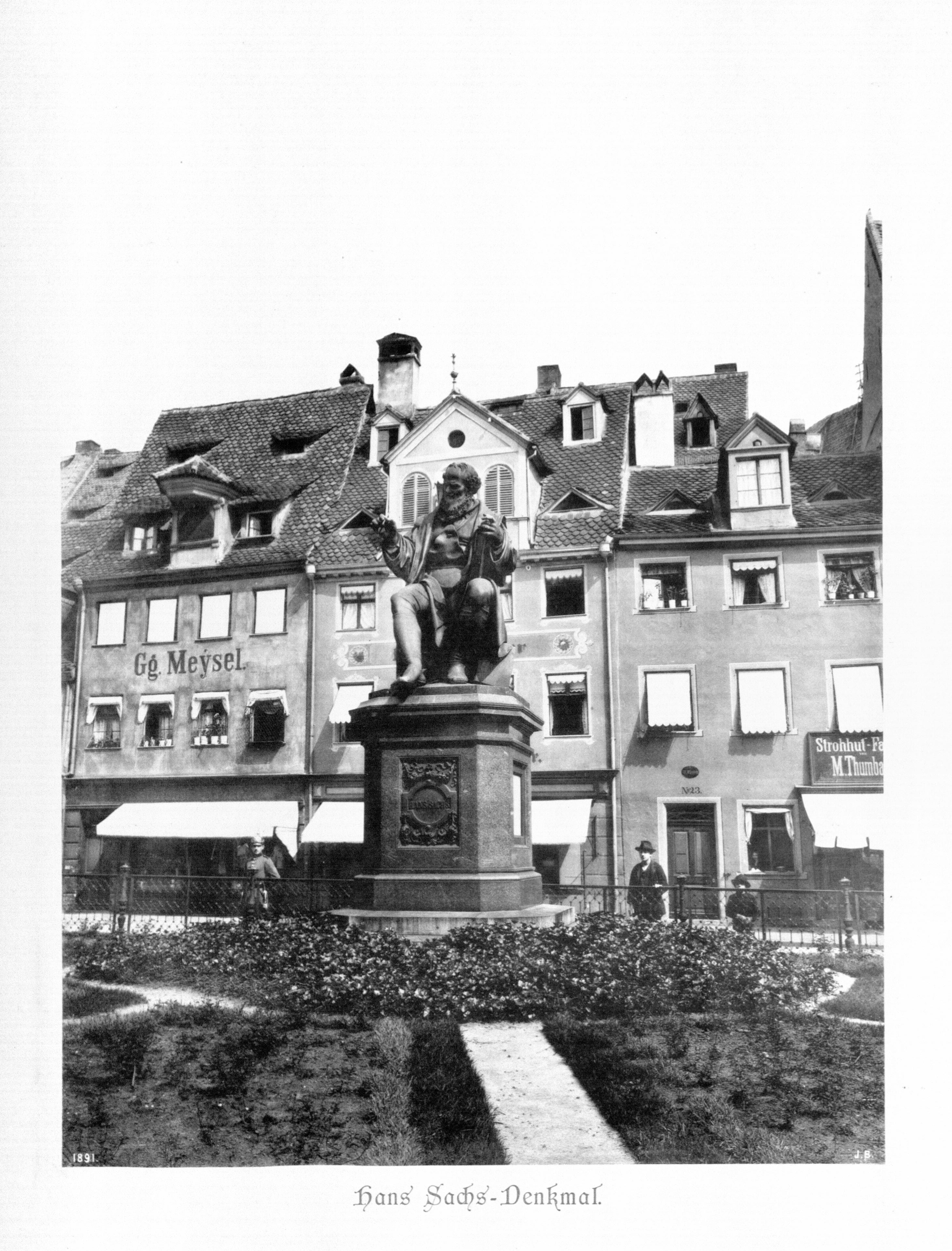 Hans Sachs-Denkmal. aus dem Band Die Baudenkmäler der Stadt Nürnberg. Erste Nürnberger Lichtdruckanstalt & Kunstverlag Brunner. Nürnberg 1891. 2011 digitalisiert von der Ohm-Hochschulbibliothek Nürnberg. Exemplar mit der Signatur: Nürnberg, Ohm-Hochschulbibliothek -- 901/2.213 / M a